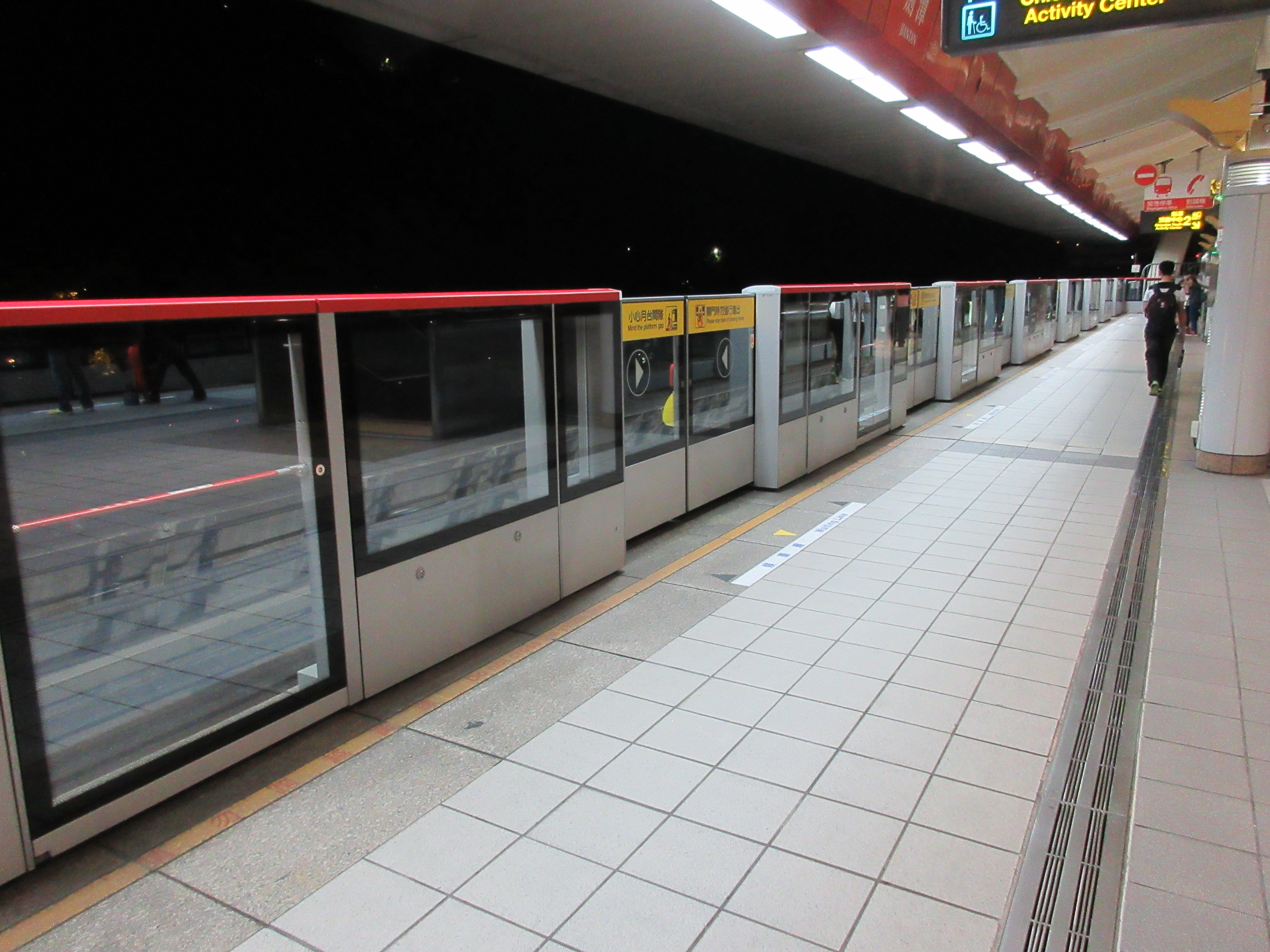 台北捷運淡水信義線・剣潭駅のプラットホーム